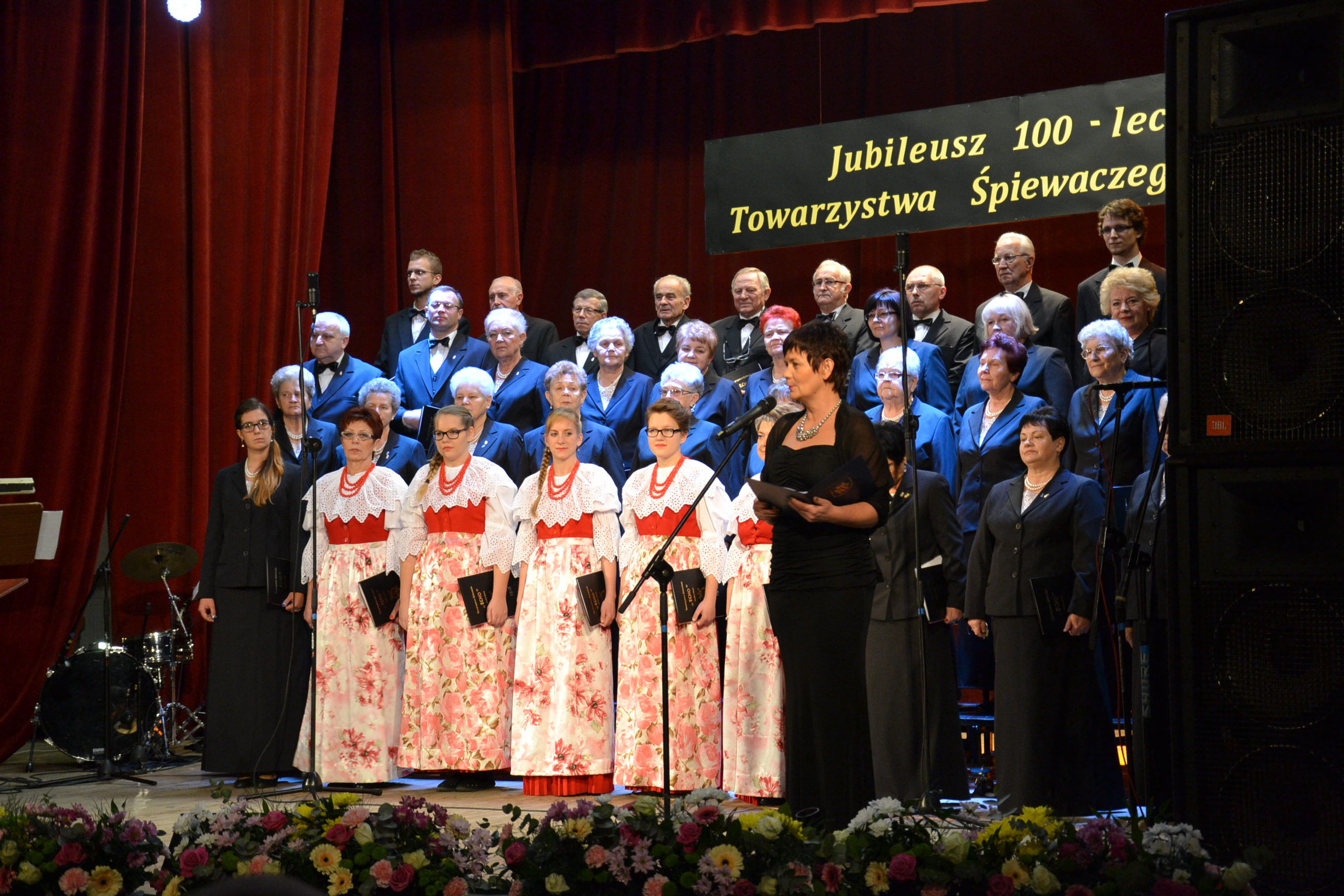 Chór "Echo" z Łazisk Górnych